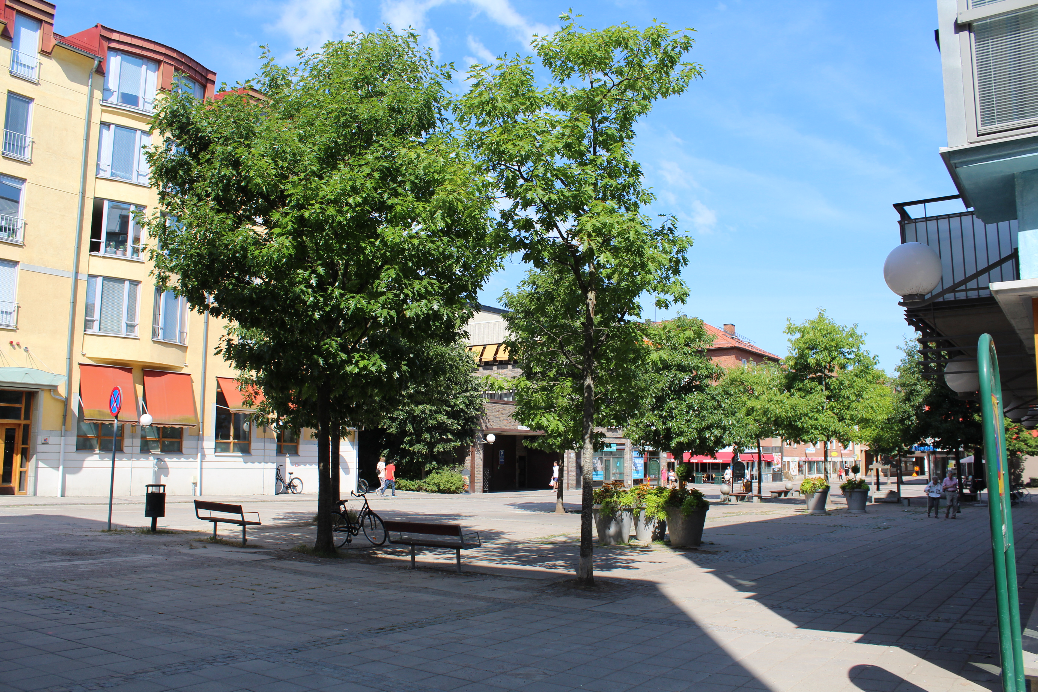 Magasintorget, Linköping